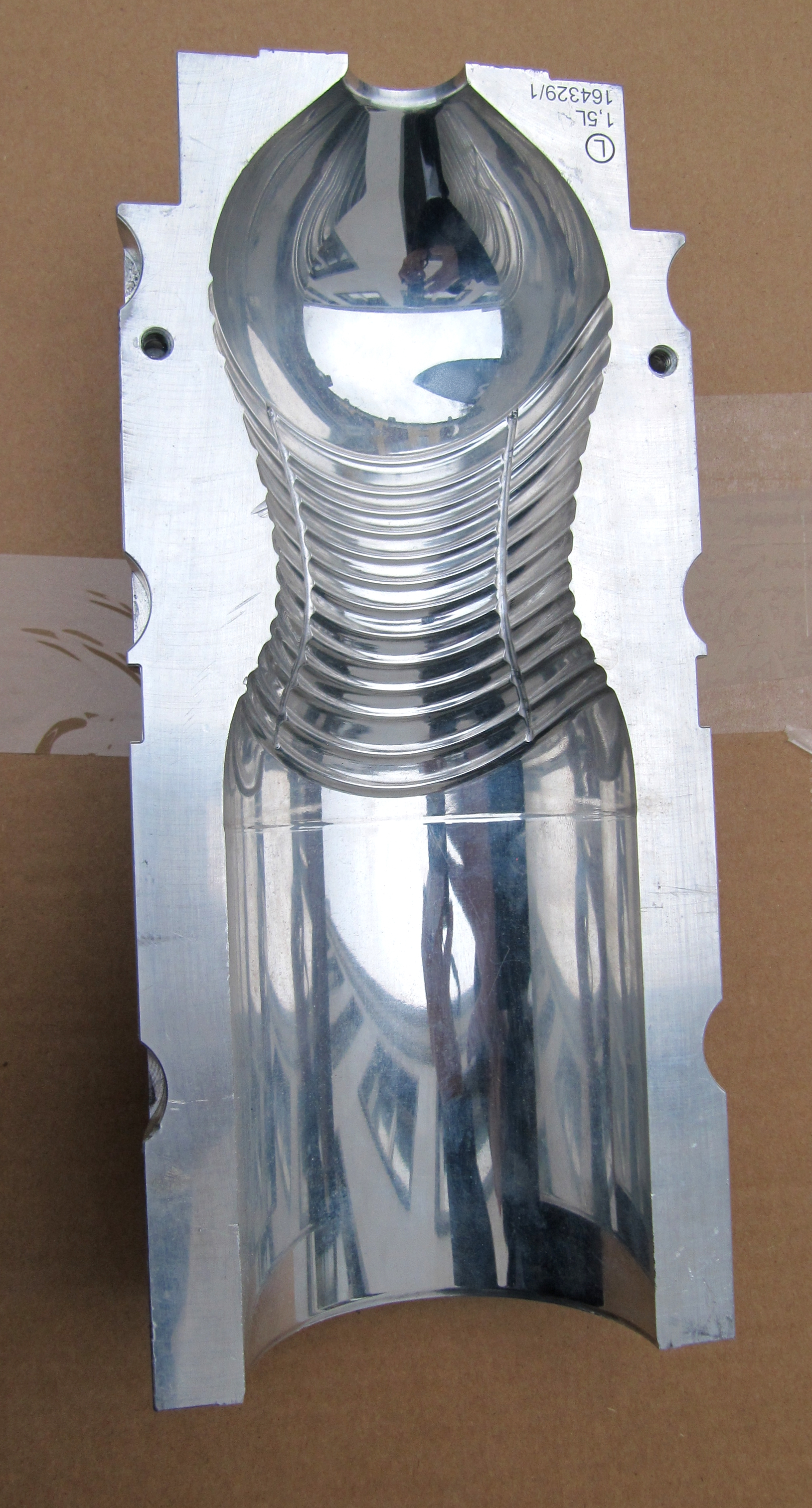 Eine Hälfte einer PET-Rohform zum Aufblasen einer PET-Flasche.